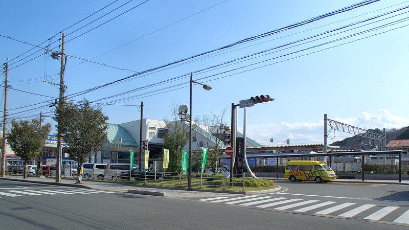 JR筑肥線筑前前原駅 北口 撮影者/著者/著作権保有者 : MK Products (本人がアップロード) 撮影日 : 2006/11/04 筑前前原駅用にアップロードした画像です。良い画像があれば別の画像に変えてください。